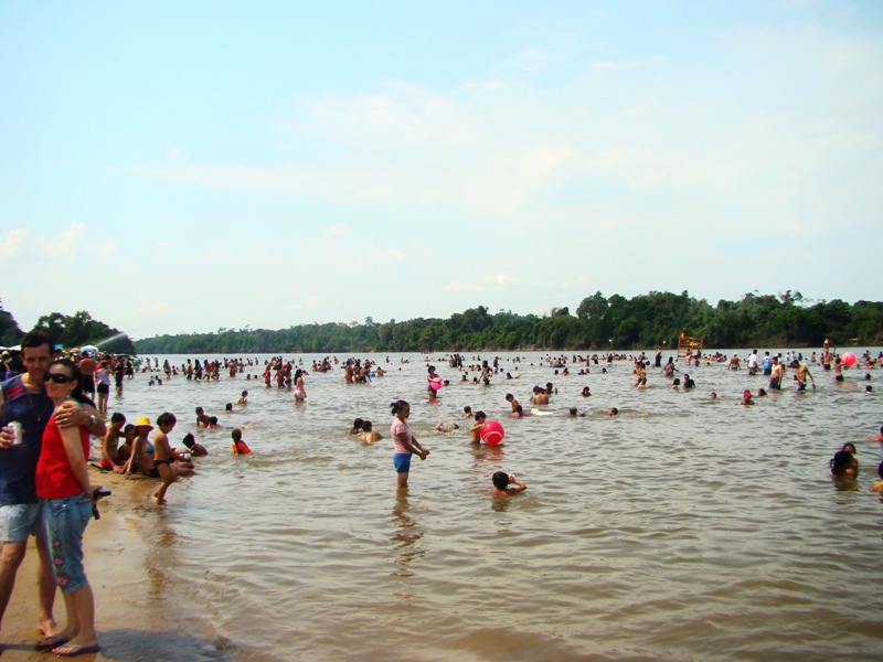 Pimenteiras